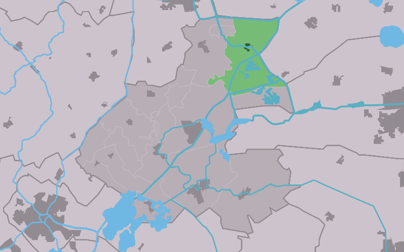 Kaartsje fan himrik fan Warten